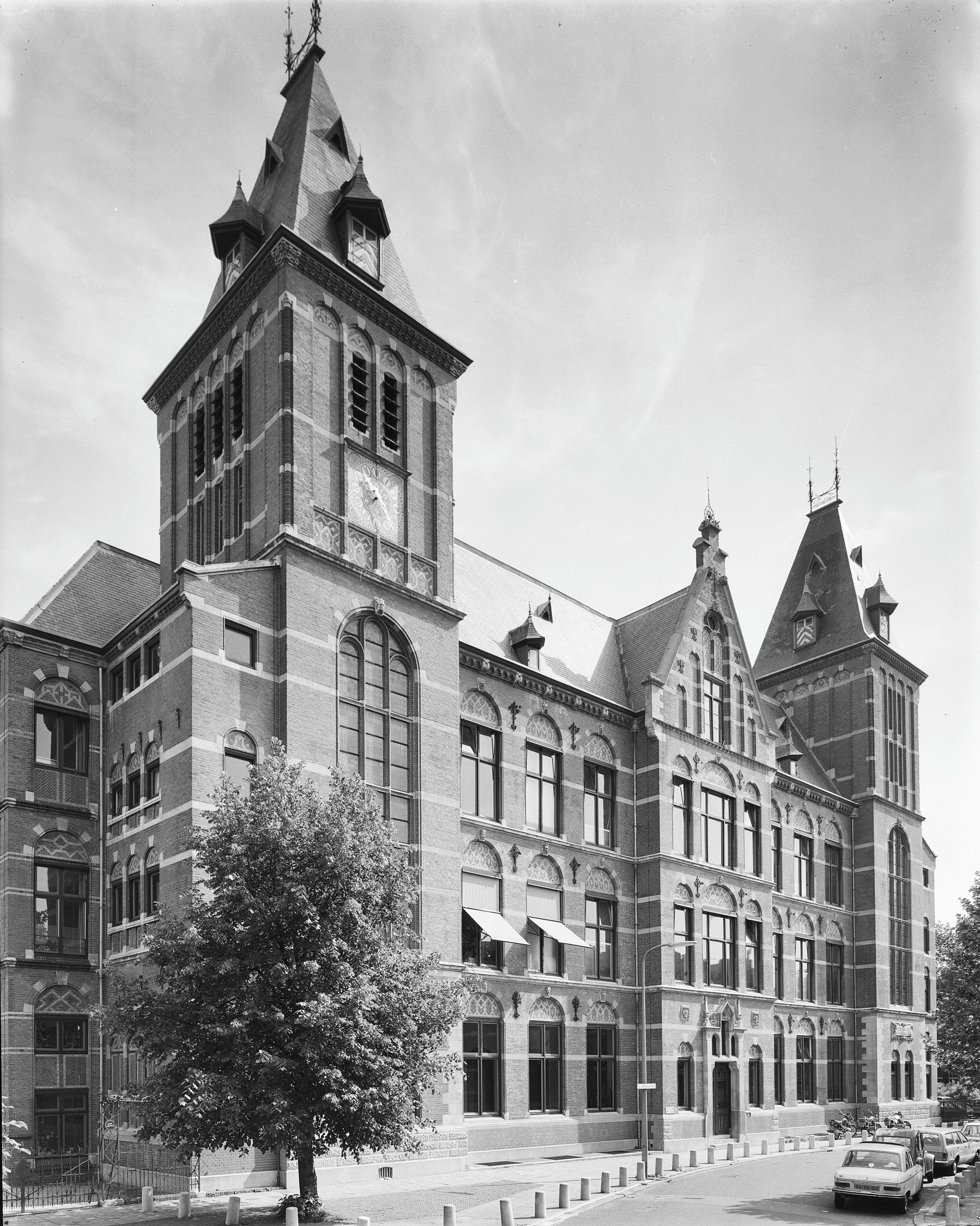 Ooglijdersgasthuis: voorgevel (F.C.Donderstraat)